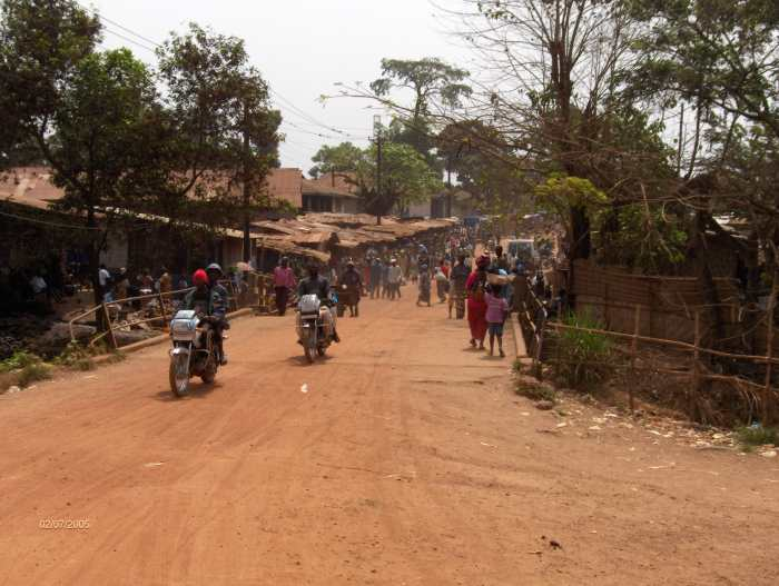 Fishery Market in Kenema, Sierra Leone